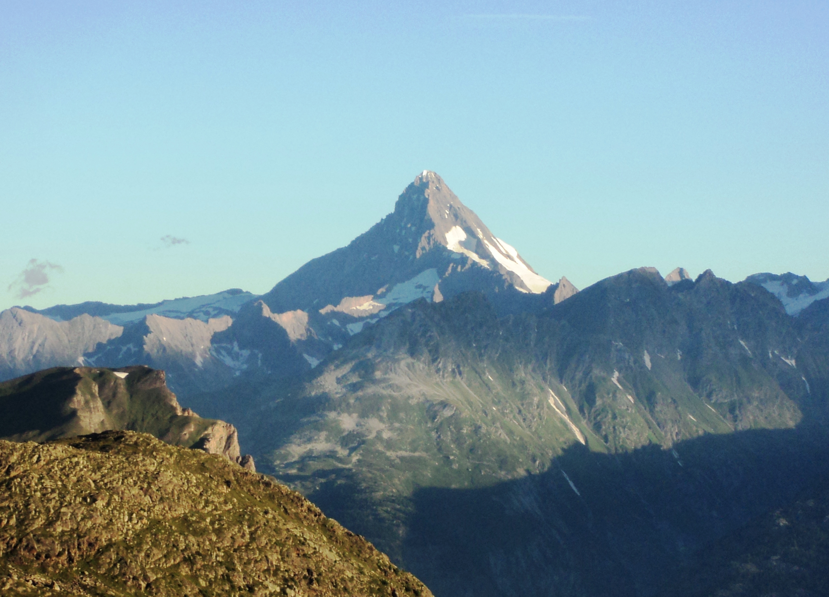 Il Bietschhorn visto da sopra il Passo del Sempione